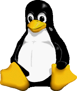 Tux, mascote do linux